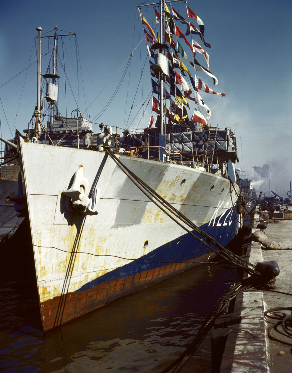 HMCS Midland.